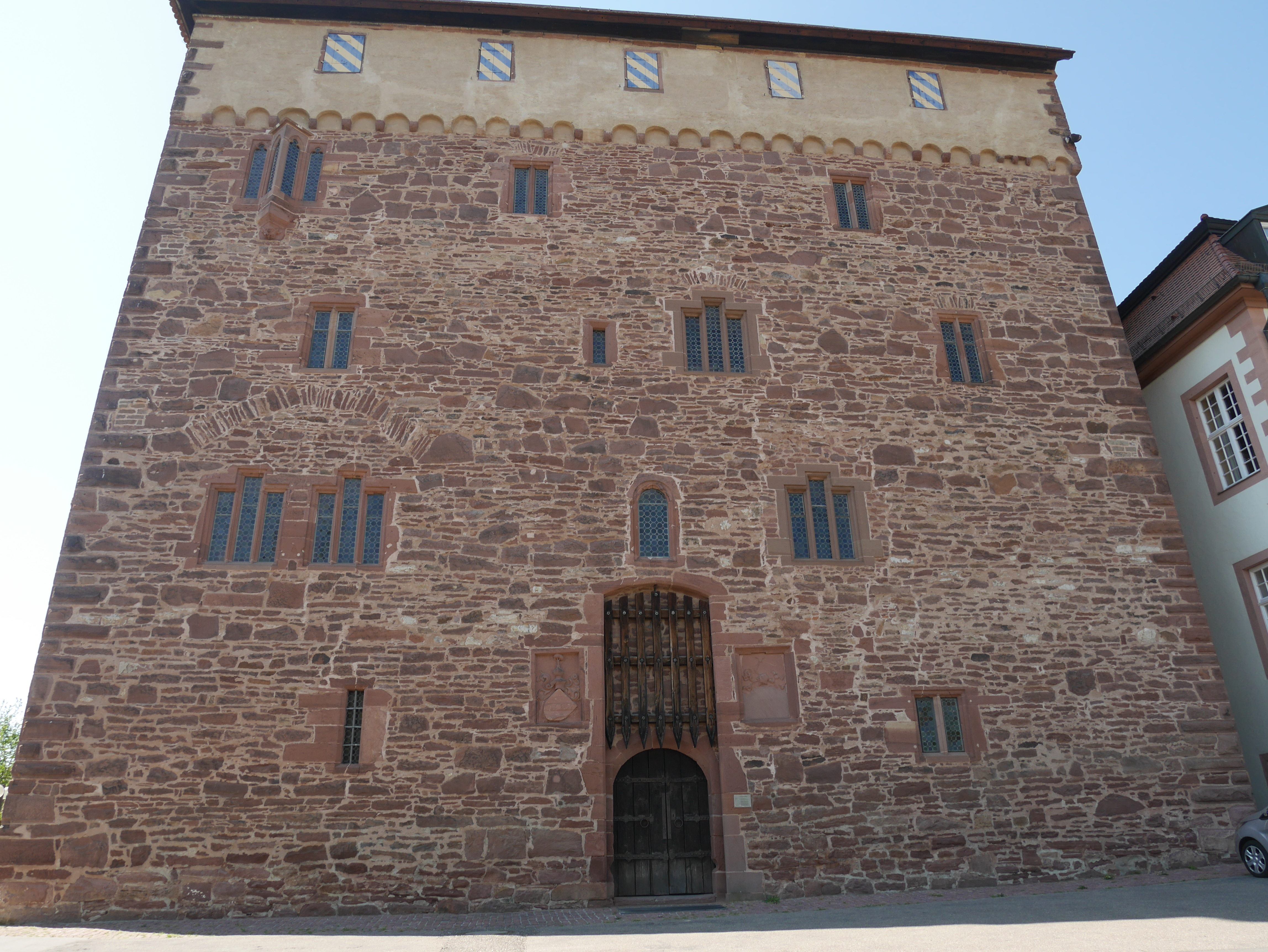 Schleglerschloss Portal